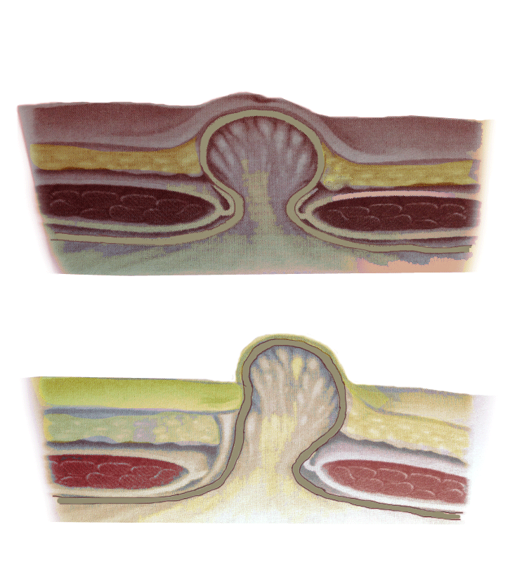 نشان دهنده روند رشد فتق ناف